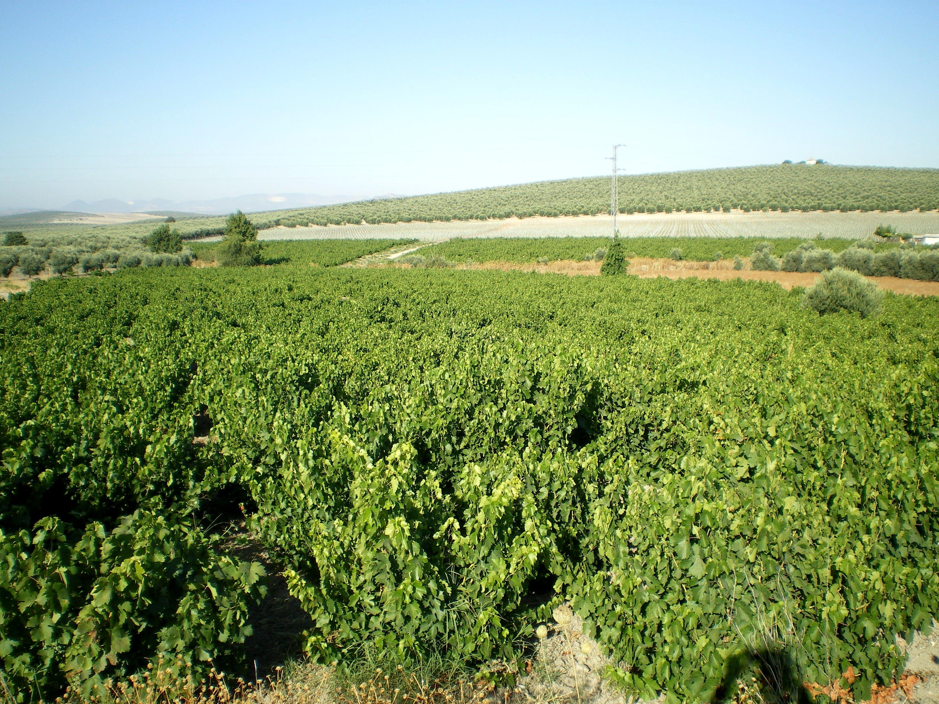 Aragonés: Vinyas d'a variedat Pedro Ximénez, tepicas en a denominacion d'orichen Montilla-Moriles, en o monecípio de Moriles (Cordoba).